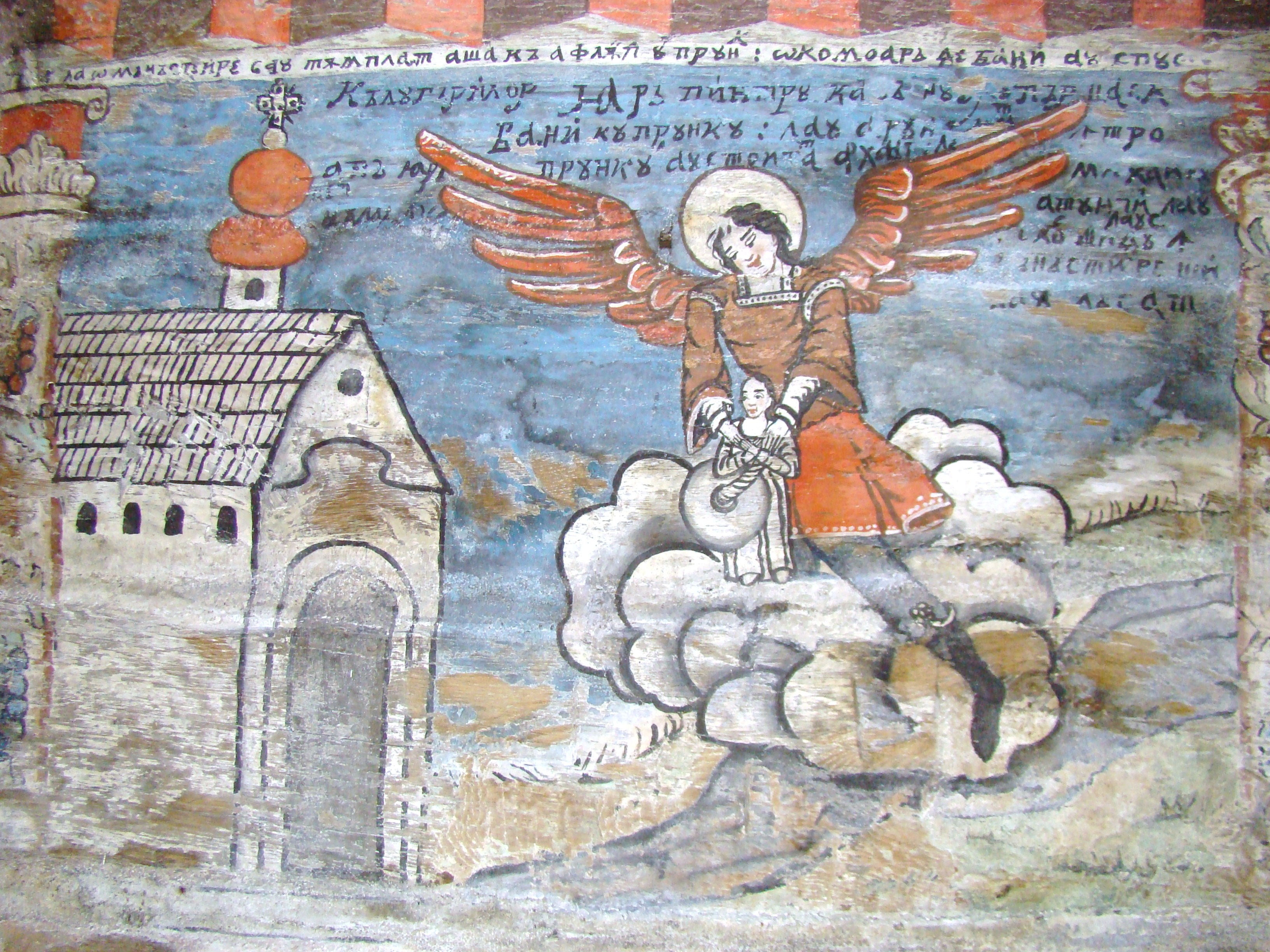 Biserica de lemn "Intrarea Maicii Domnului în Biserică" , sat BÂRSANA